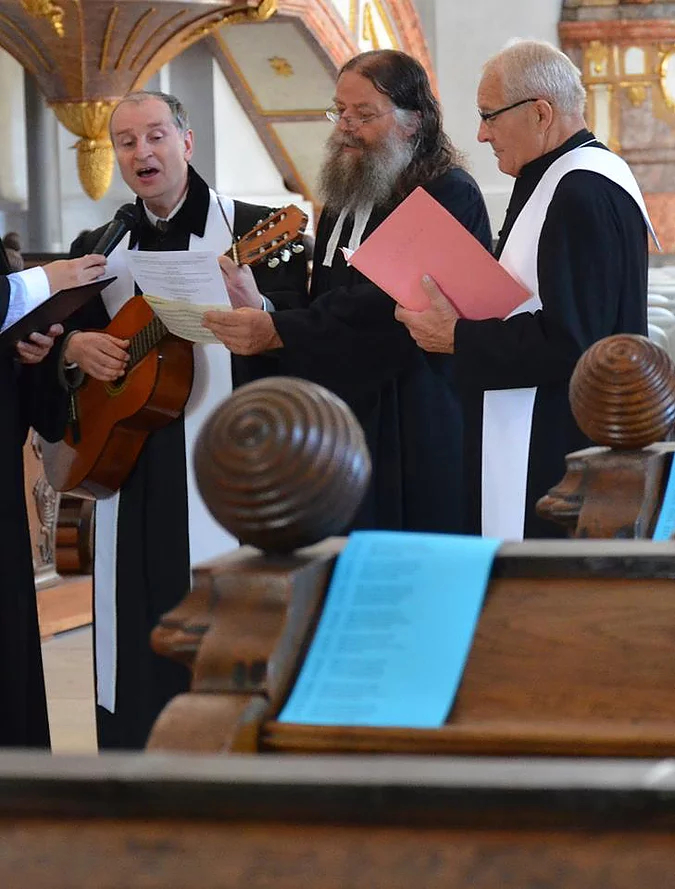 František Beneš na ekumenické akci v Litomyšli